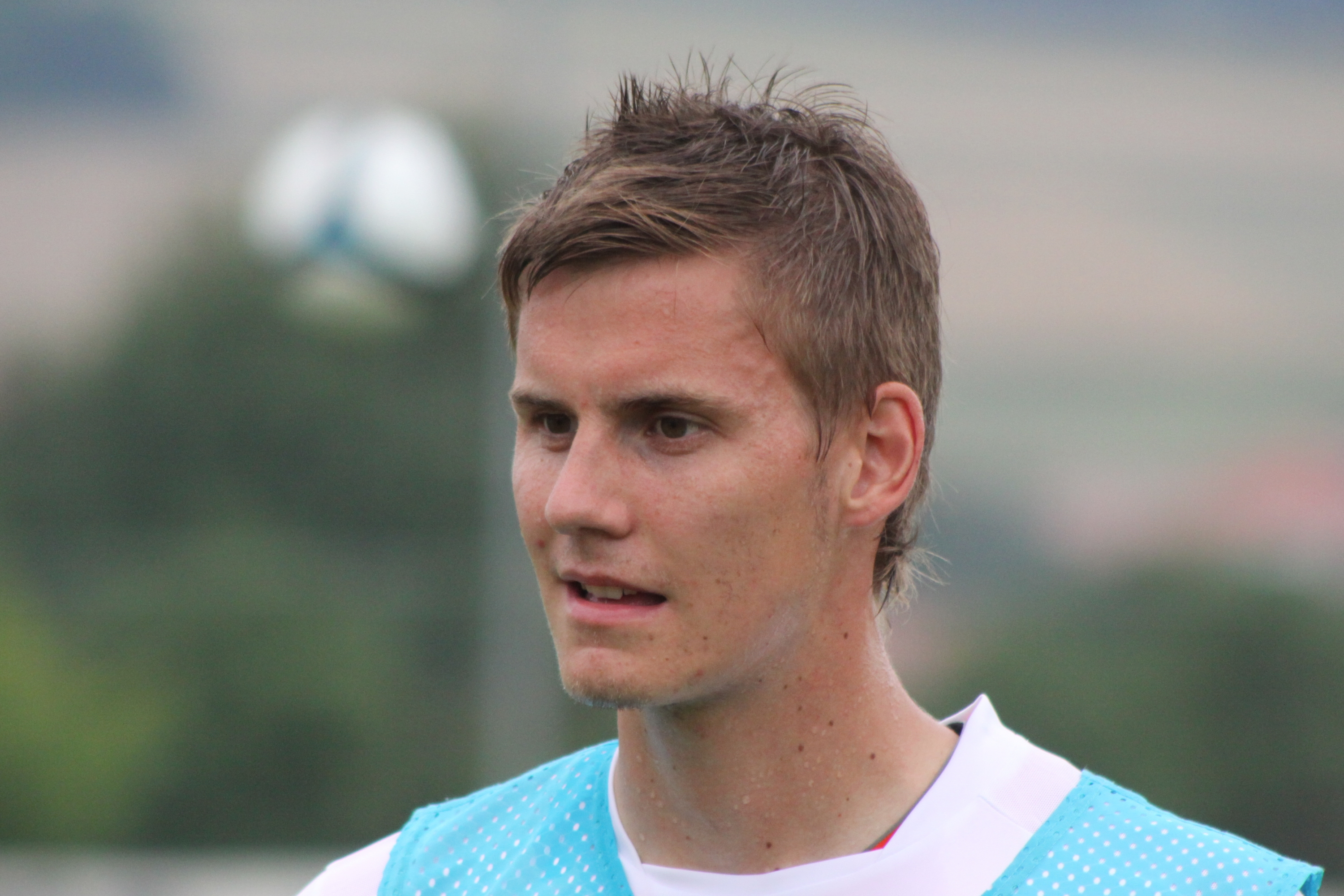 Torsten Oehrl - SV Werder Bremen (2)